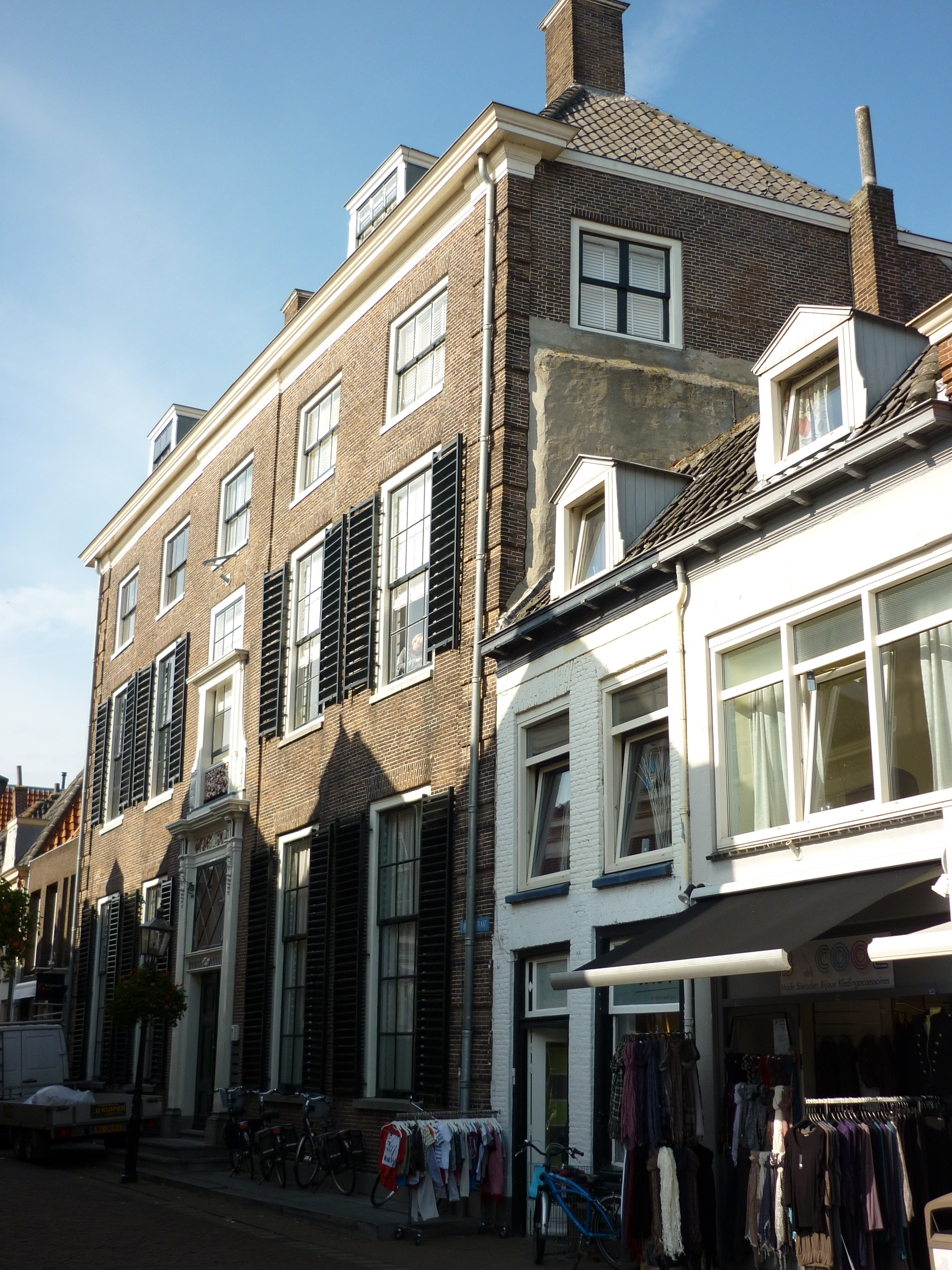 Bruggestraat 49, Harderwijk, Gelderland